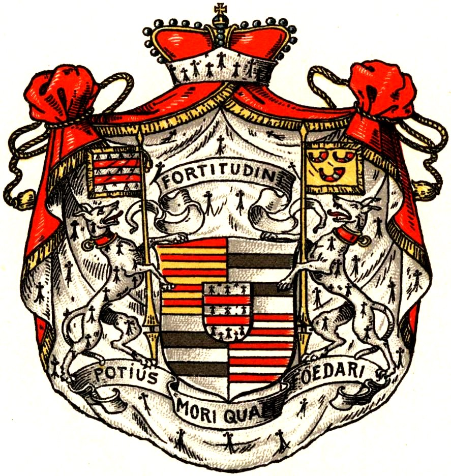 Wappen der Herzöge von Looz-Corswarem